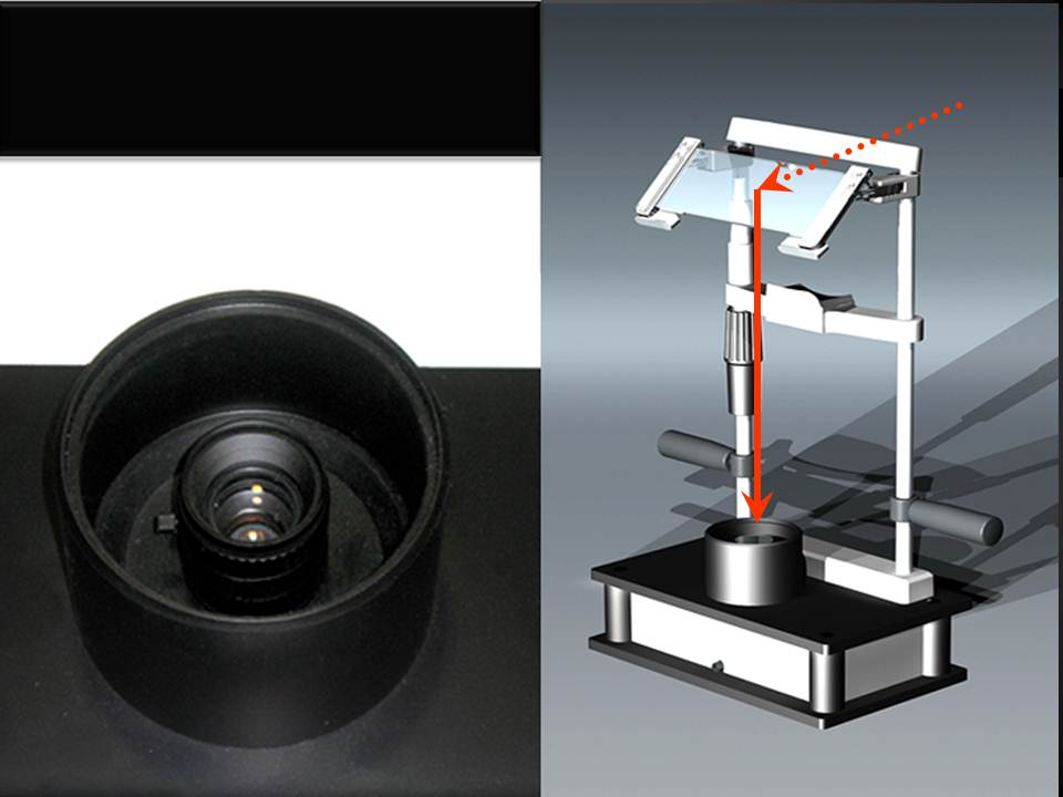 Equipo de video-oculografía para investigación y exploración de la motilidad ocular. Las sensaciones de los ojos iluminados por dos LED infrarrojos llegan al cristal dicroico colocado a 45º, donde se reflejan para ser captados por una cámara de alta resolución.